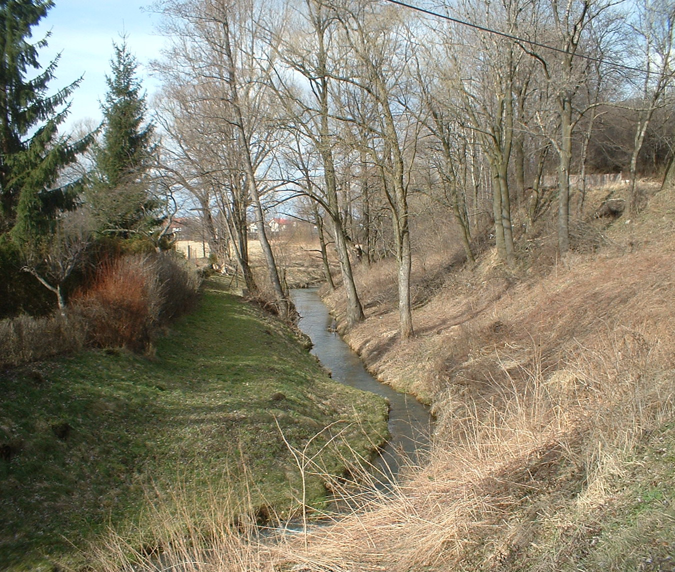 Potok Badoń wpływa do rzeki Lubatówki w Suchodole